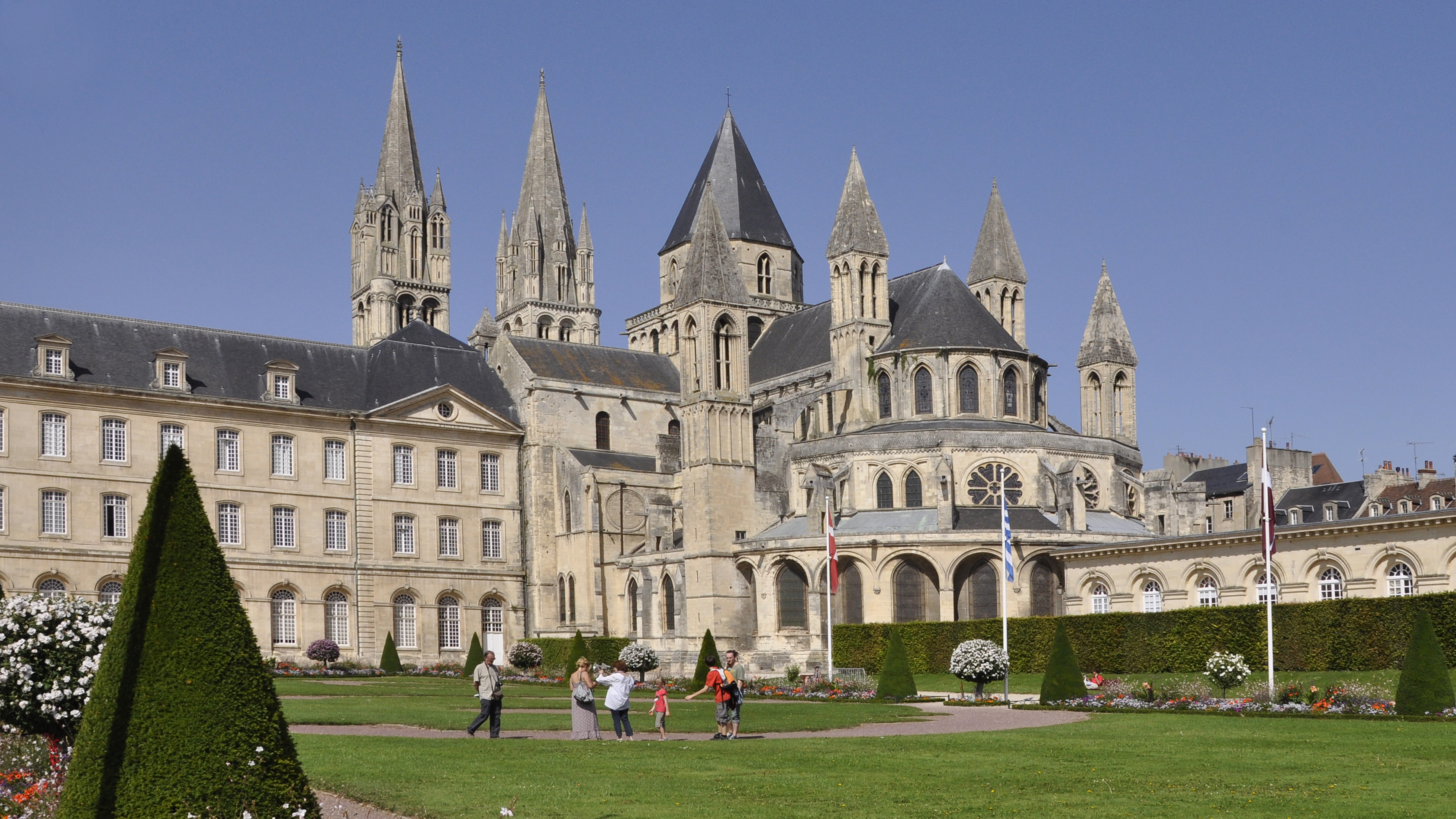 Abbaye aux Hommes in Caen, Frankrijk